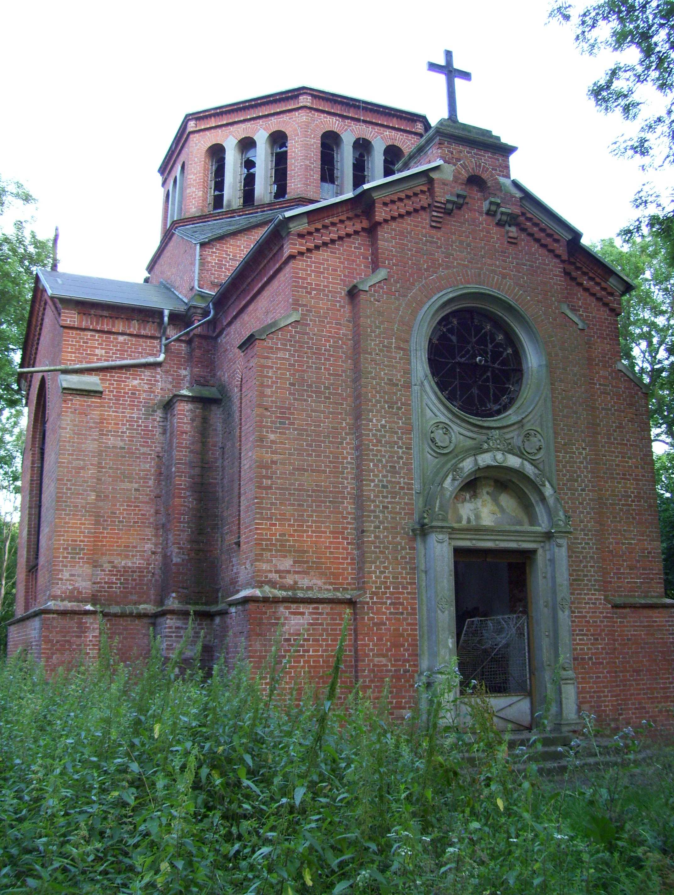 Burgberg Wolde - Landkreis Demmin - Kirchenruine Westseite